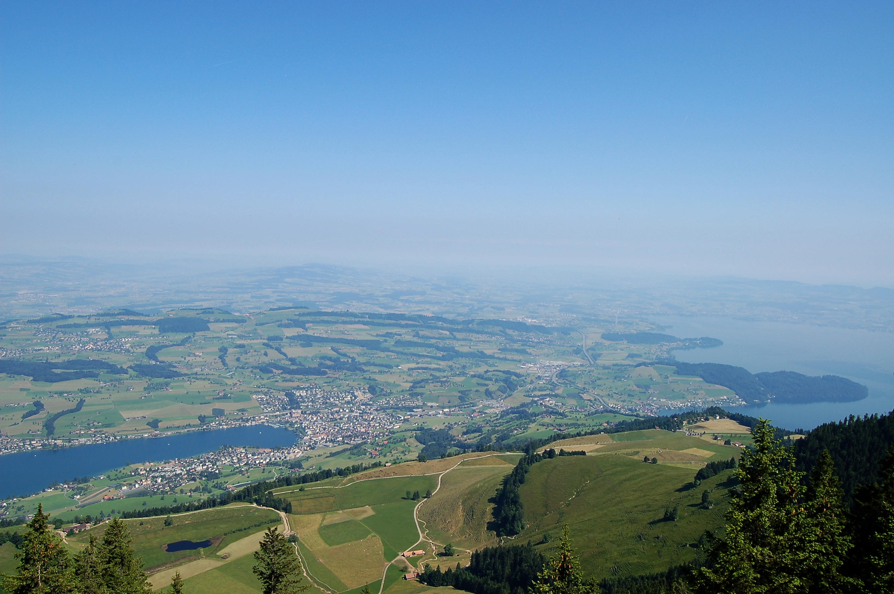 Blick vom rigi auf küsnacht und zugersee ins Mittelland